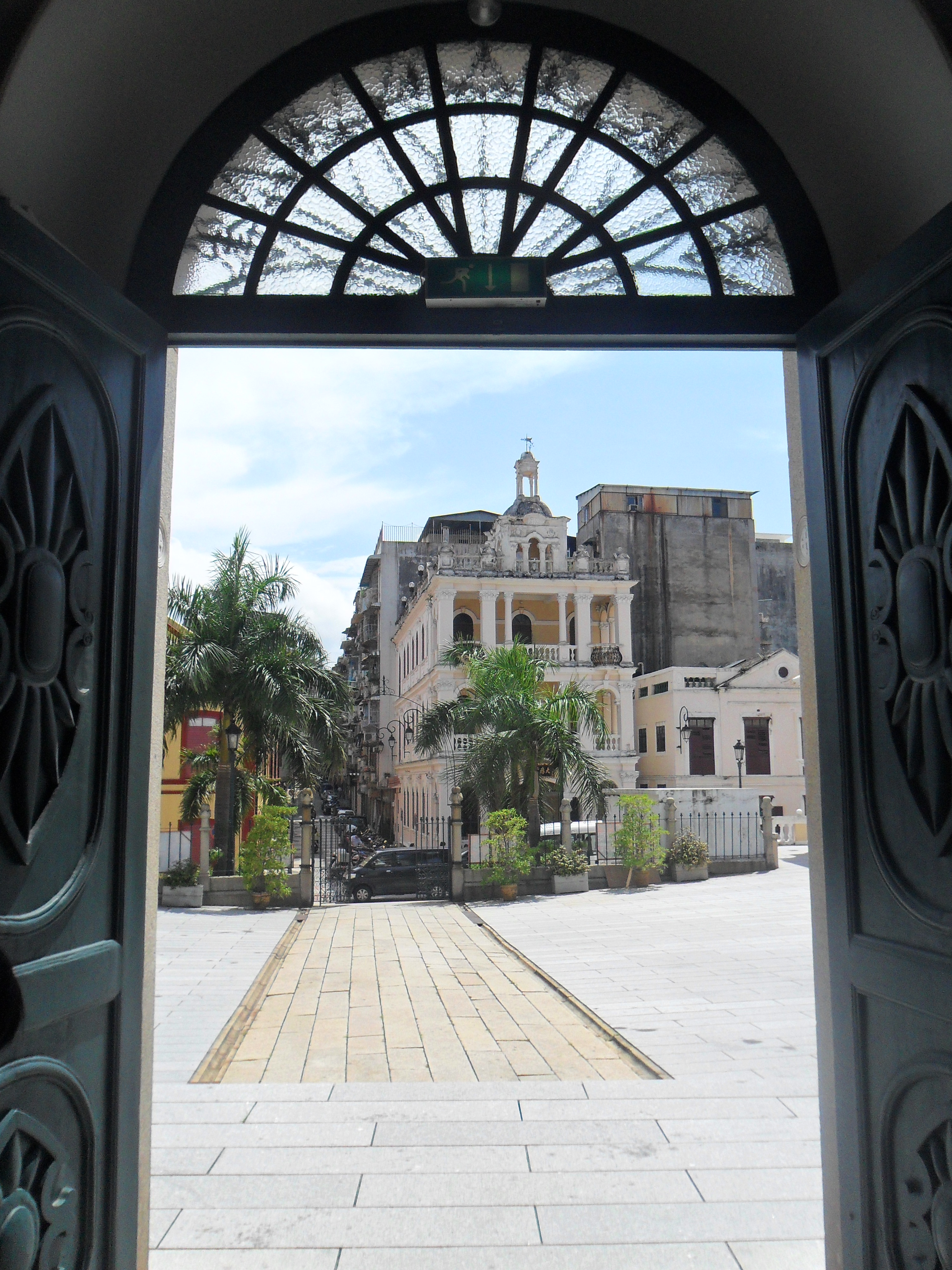 中文（香港）: 望德聖母堂, 澳門, 中國